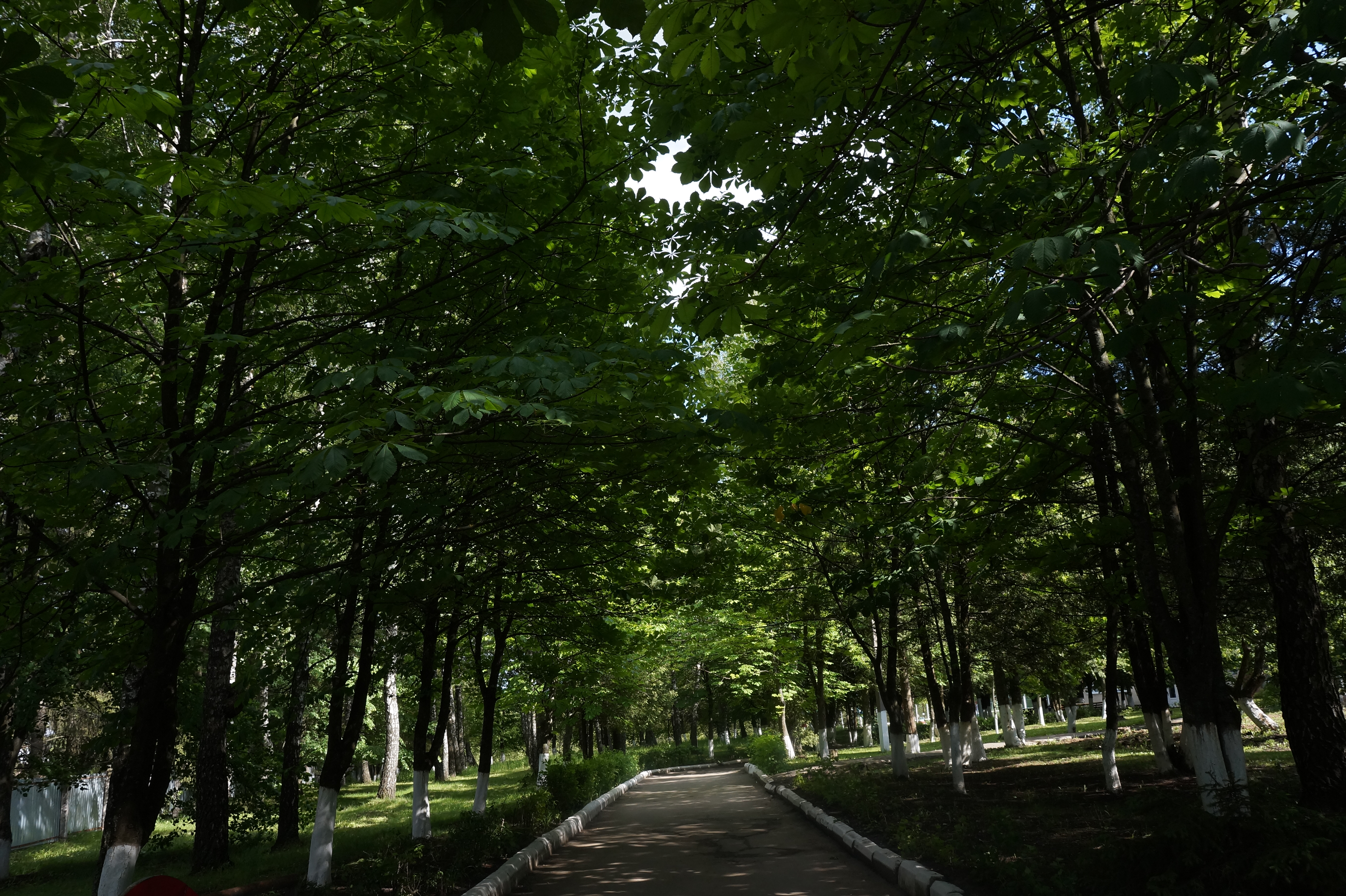 Алея каштана і бука європейського, Ярмолинецький район, с. Скаржинці